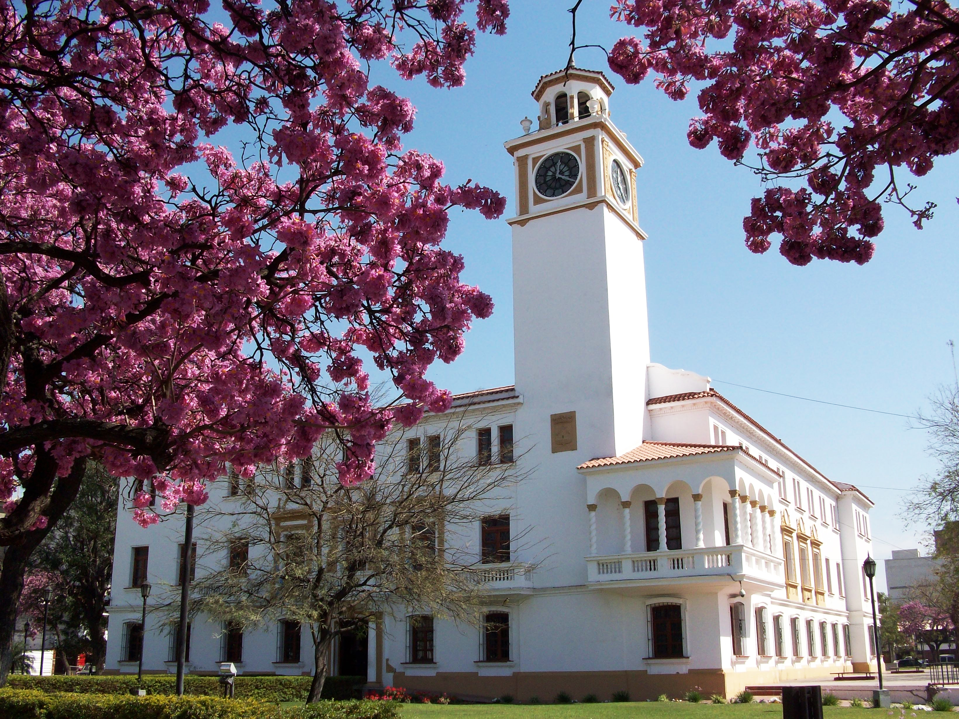 Casa de Gobierno de la provincia de Santiago del Estero, ubicada en la ciudad capital.